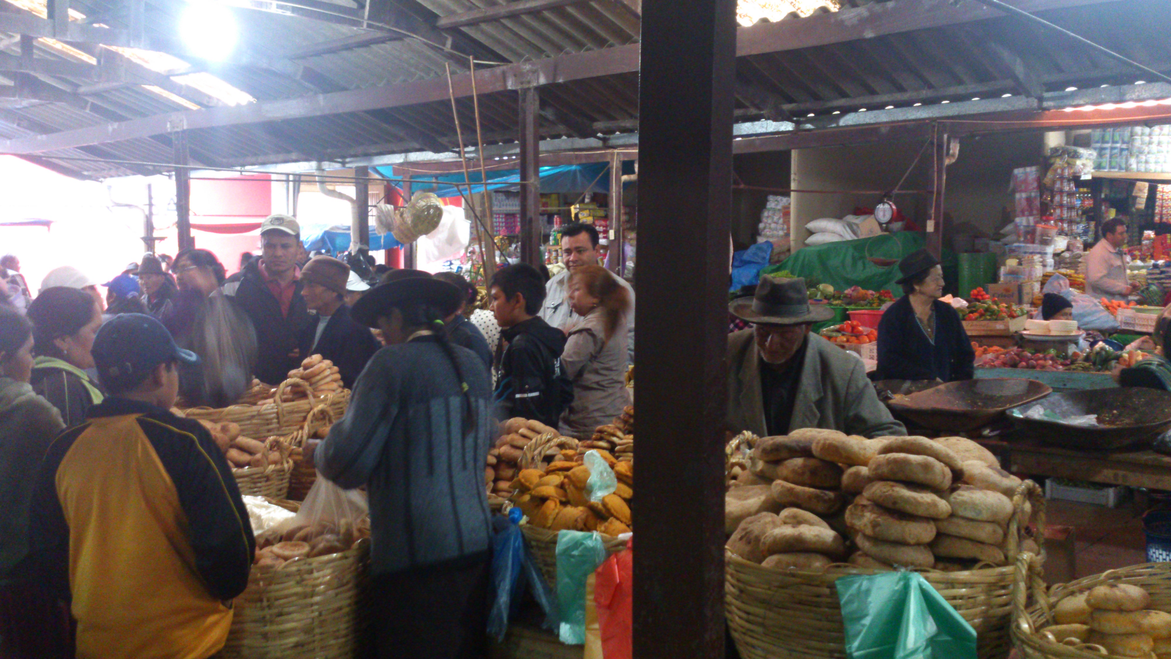 señoras de vallegrande vendiendo panes